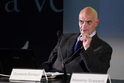 Sociologo